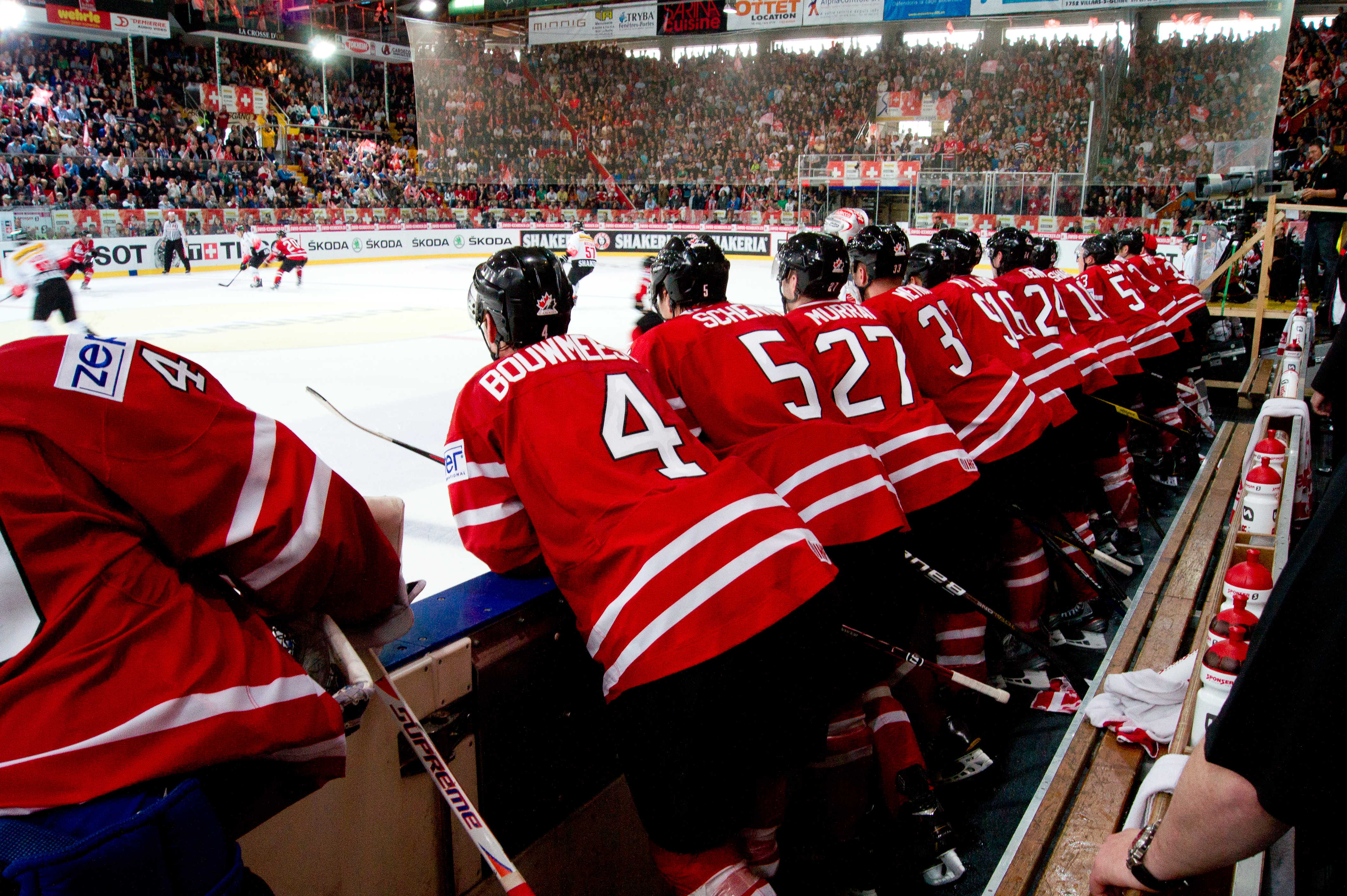 Patrick Sharp - Suisse vs Canada 28 avril 2012